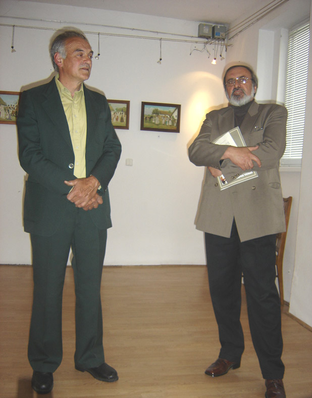 Klep, klep i šareno jaje, izložba,Osijek, IV/V. 2006.